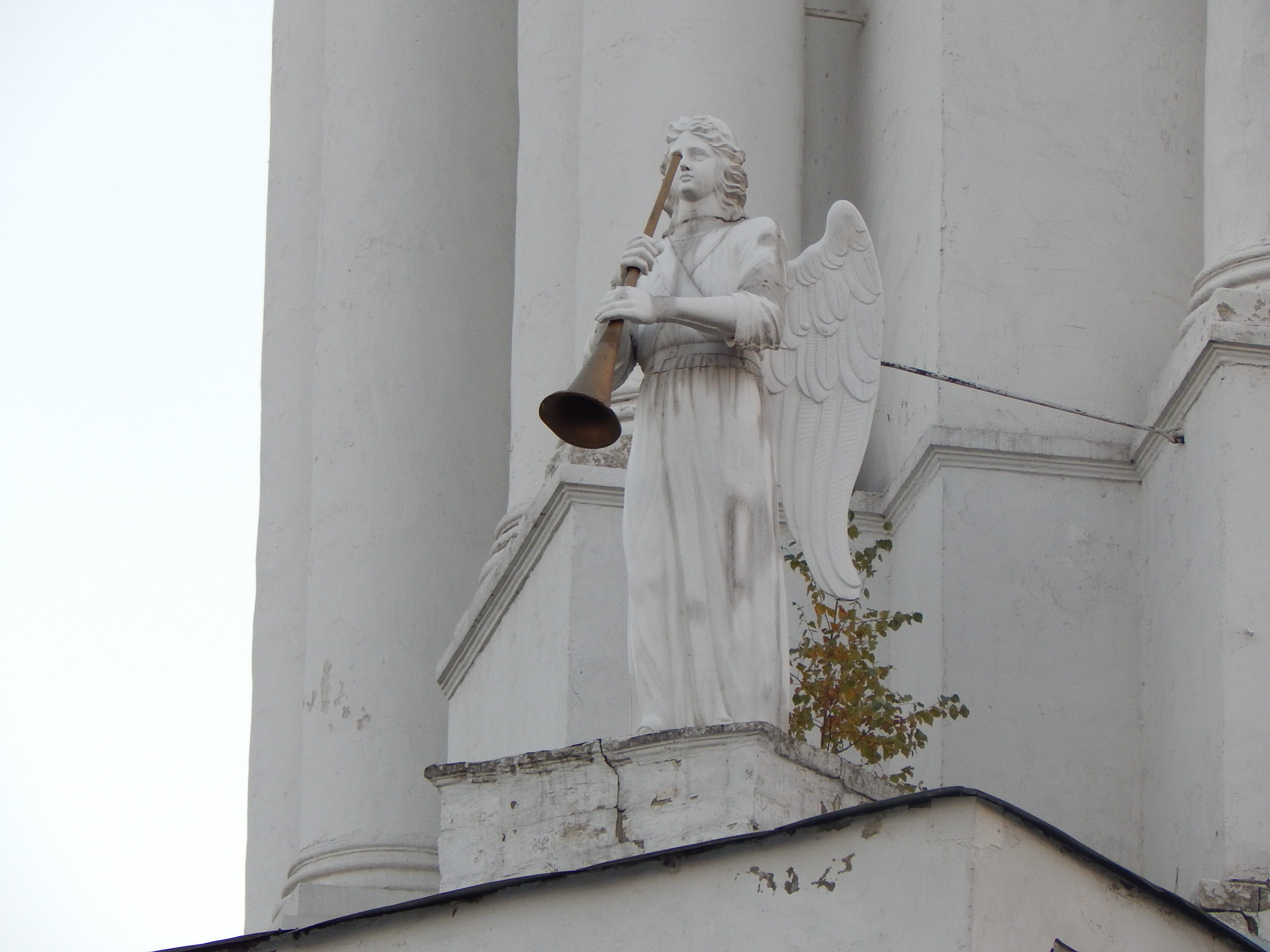 Колокольня. Кладбище Всехсвятское (Тульская область, Тула, город Тула, Льва Толстого улица, 79 (лит. Б))